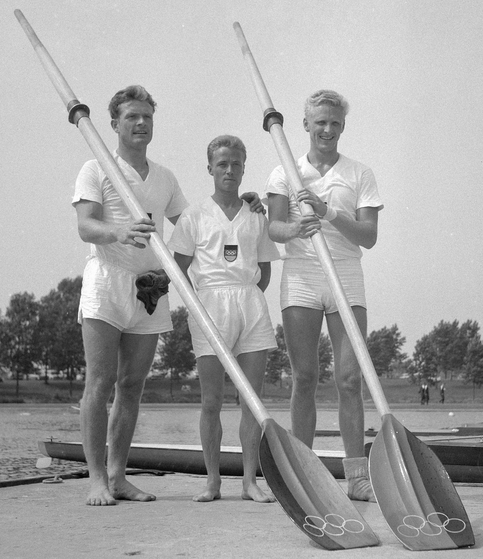 Europese roeikampioenschappen op de Bosbaan, Duitse twee met stuurman in actie